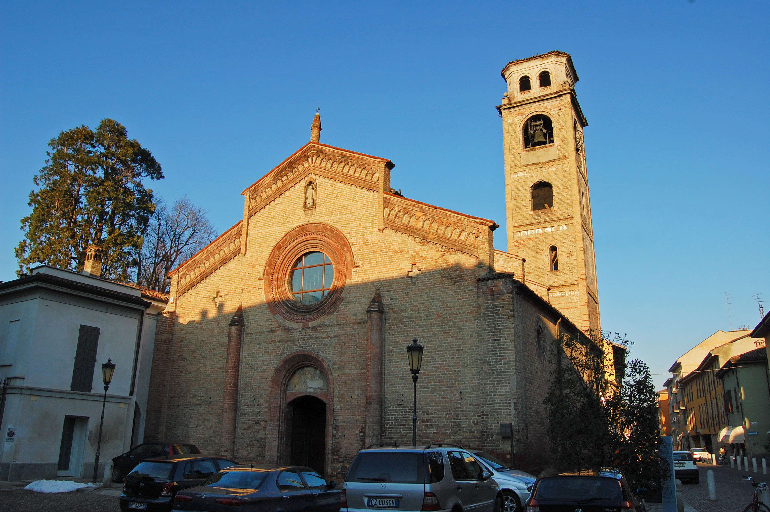 Facciata della Chiesa di San Lorenzo a Lodi